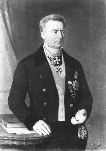 Johann Eduard von Schleinitz (1798–1869), Gemäde von Ernst Resch, (1807–1864)